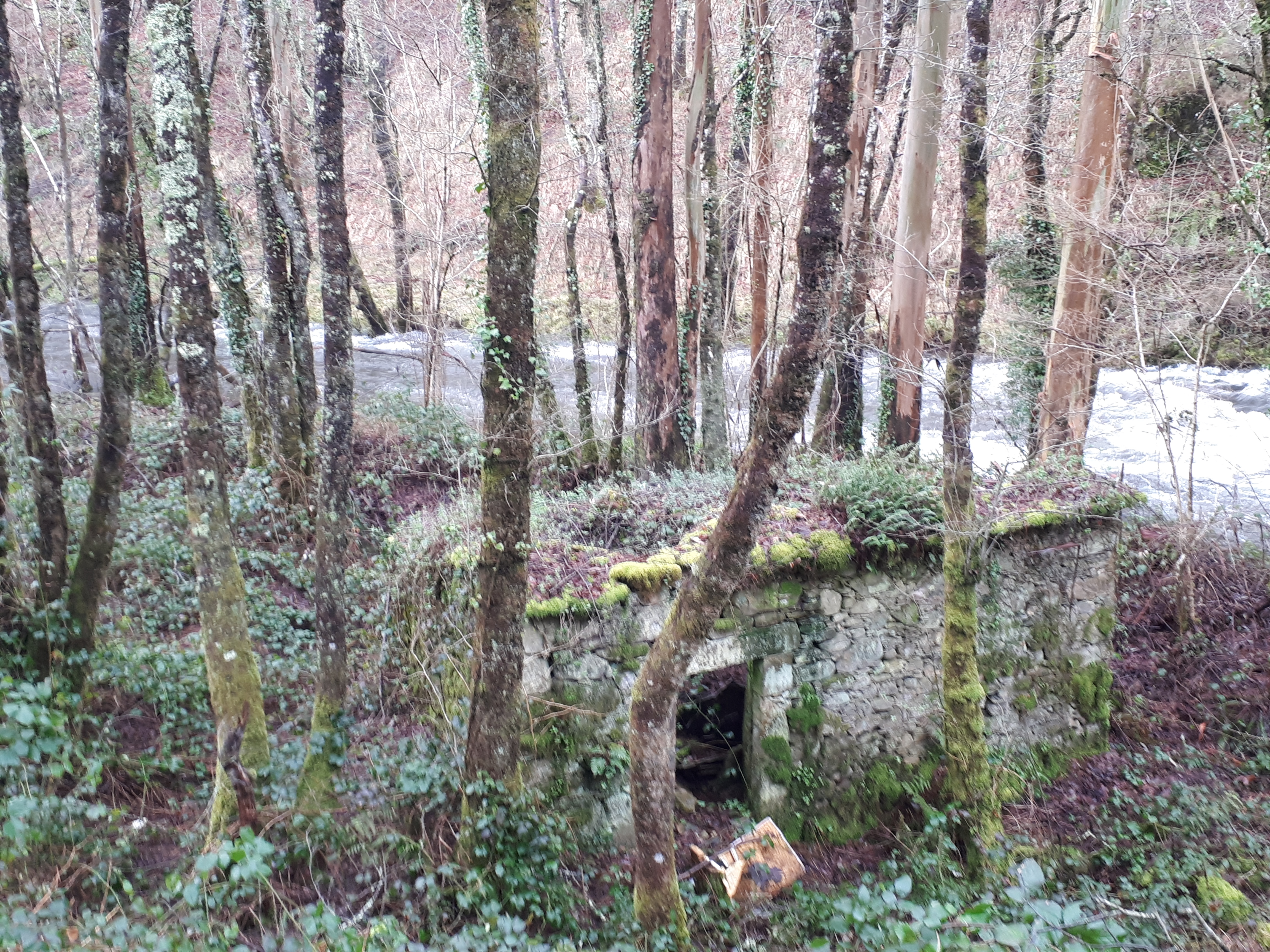 Muíño do Cura en Rivela